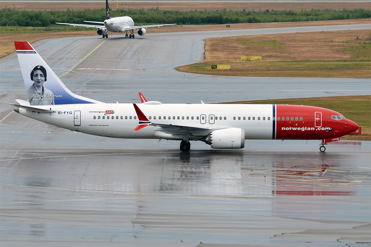 Norwegian, EI-FYG, Boeing 737-8 MAX